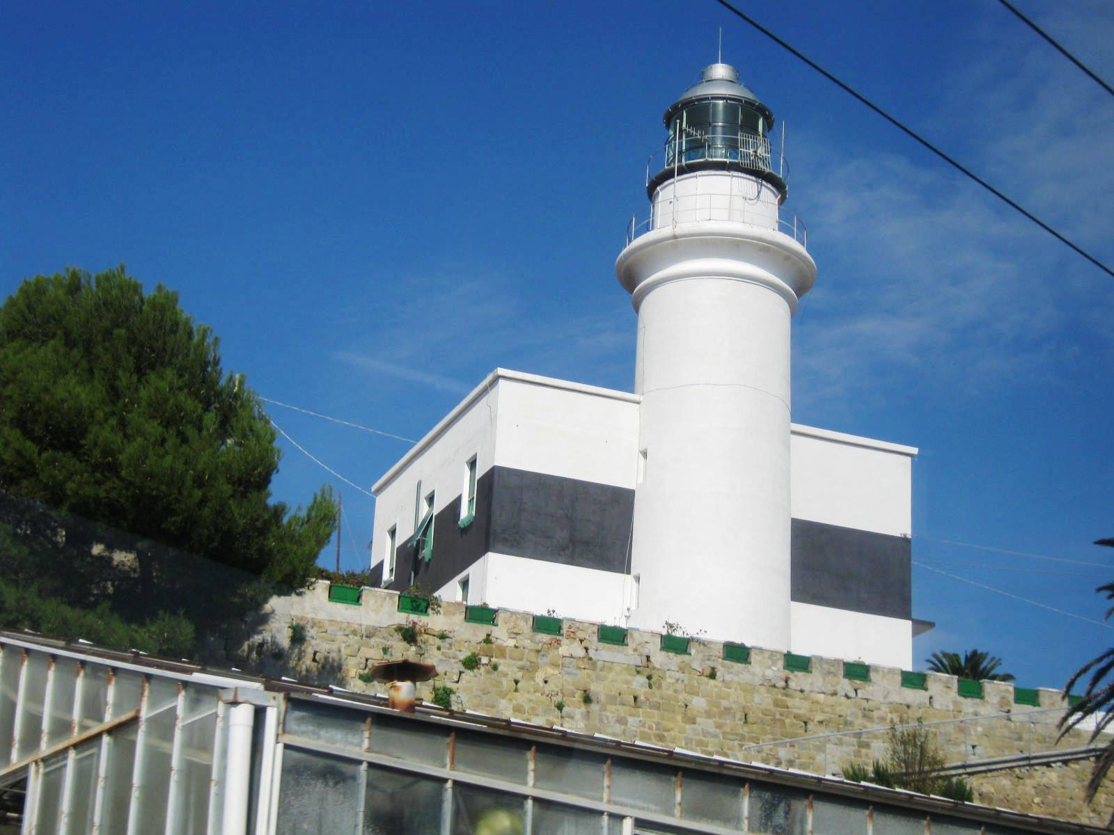 Vuurtoren van San Remo.